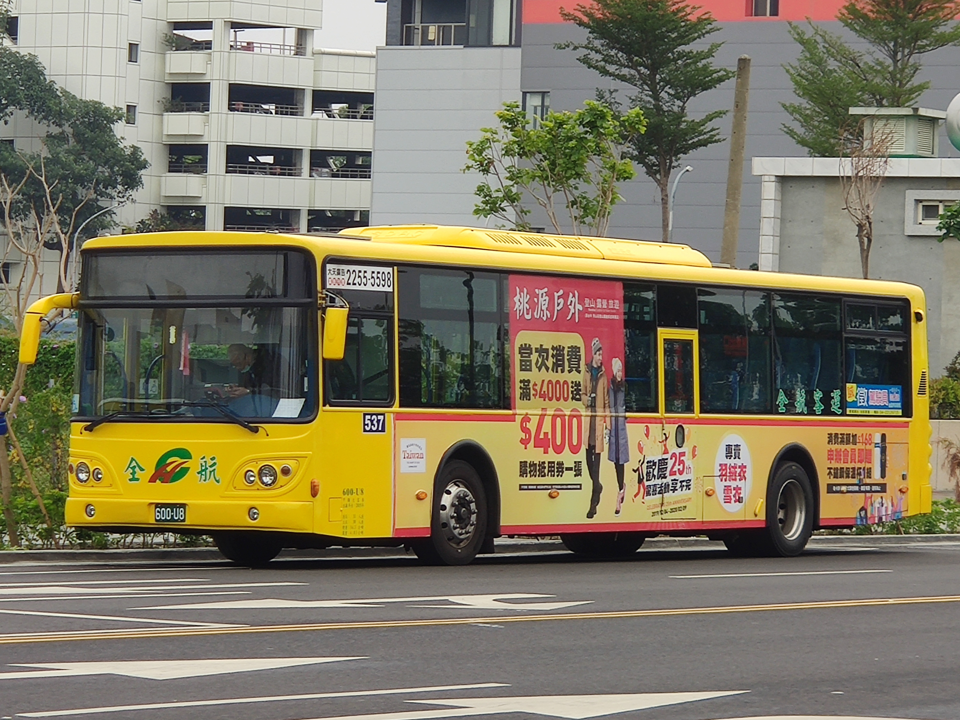 全航客運 大宇BS120CN大客車 600-U8